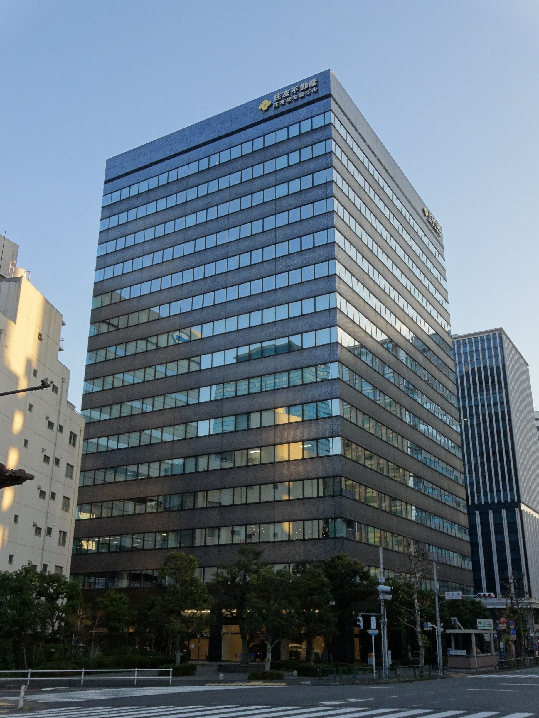 住友芝公園ビル